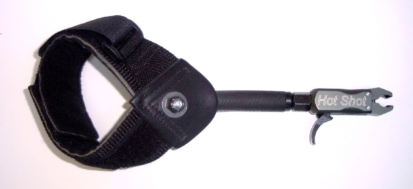 Zangenreleas mit Handschlaufe für Comopund-Bogenschützen